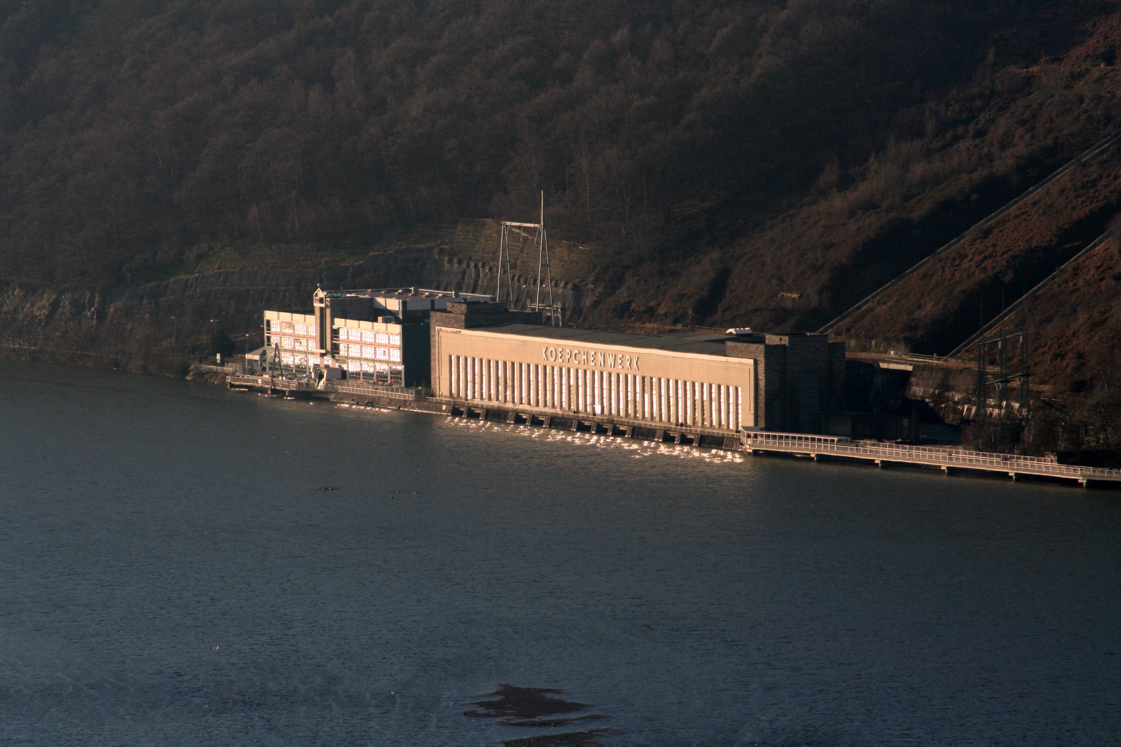 RWE Koepchenwerk, Hengsteysee